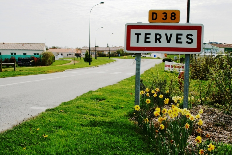 Français